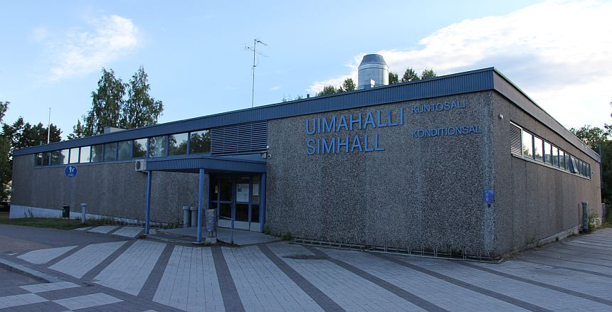 Martinlaakson uimahalli. Martinlaakso, Vantaa. Huom: Muista säilyttää viittaus kuvaajaan, mikäli käytät kuvaa.